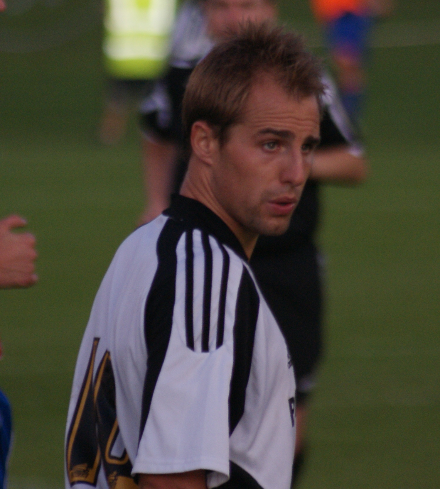 Luke Varney 2nd Half